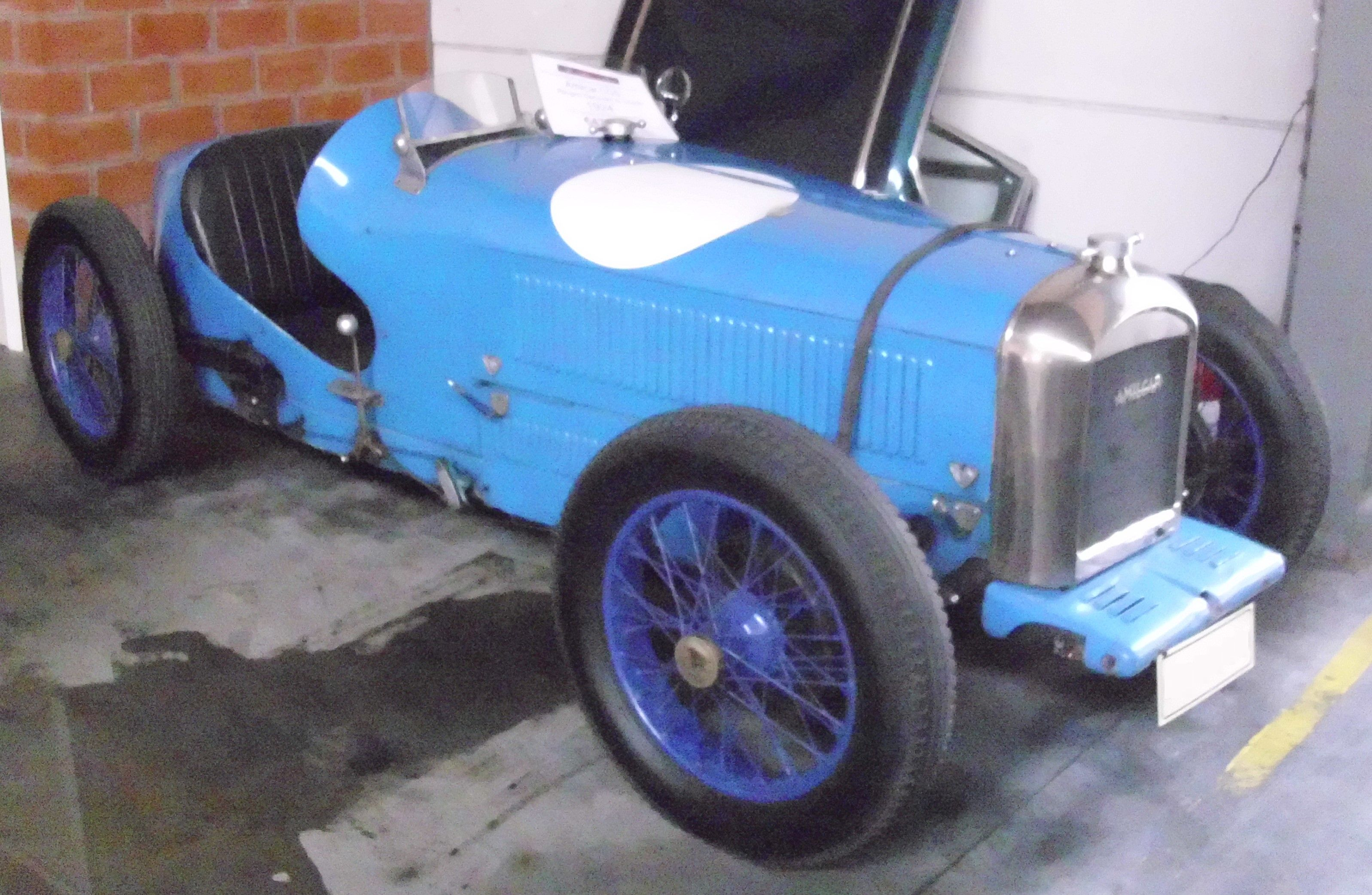 Amilcar Type CGS Roadster von Panigoni 1924